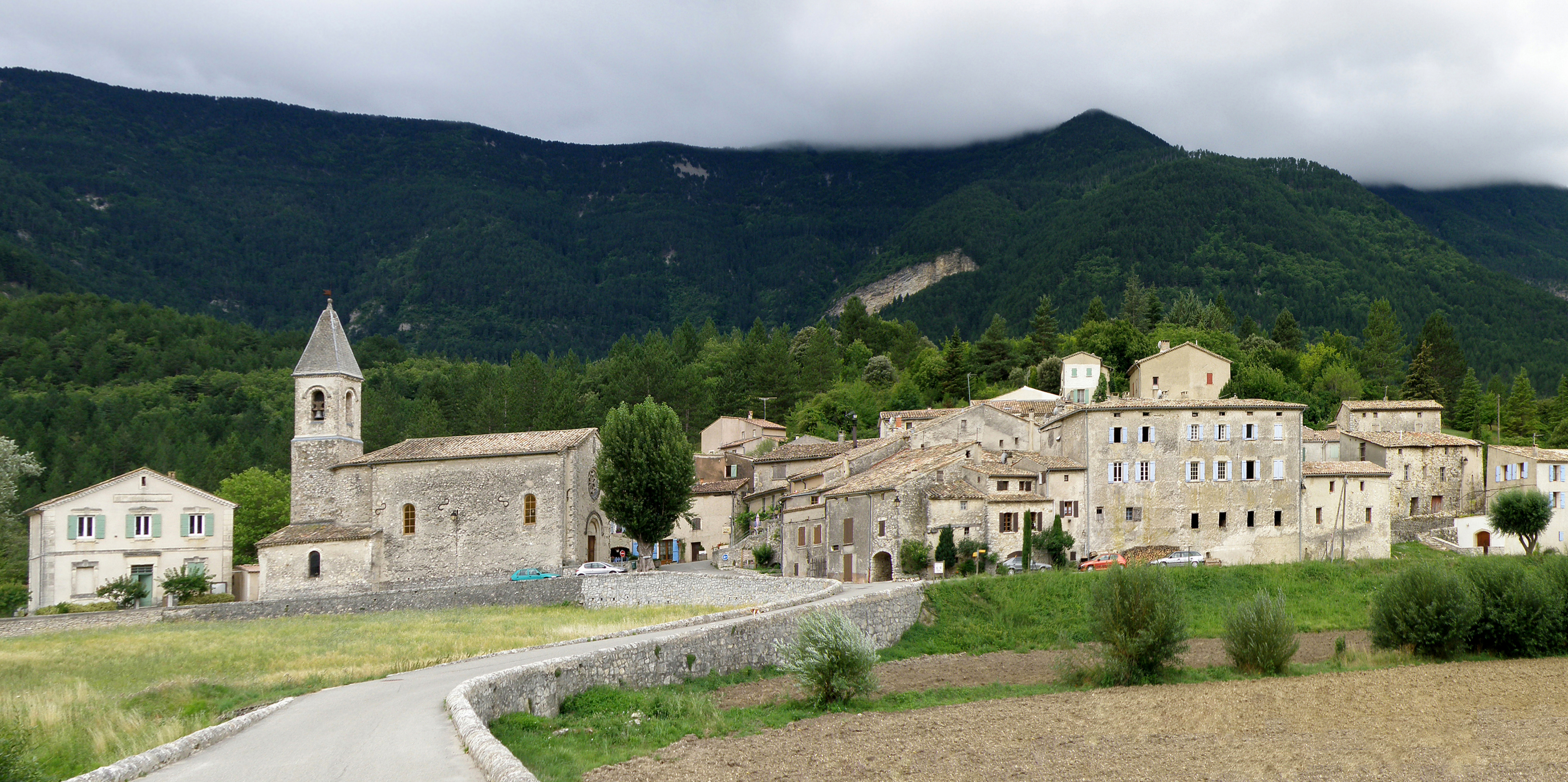 Savoillan (Vaucluse, France). Vue générale.